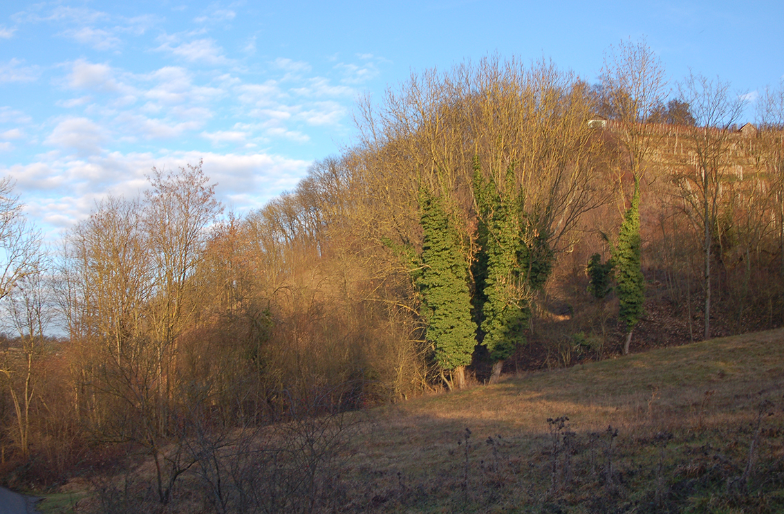 Markgröningen: Schlüsselberg von Süden